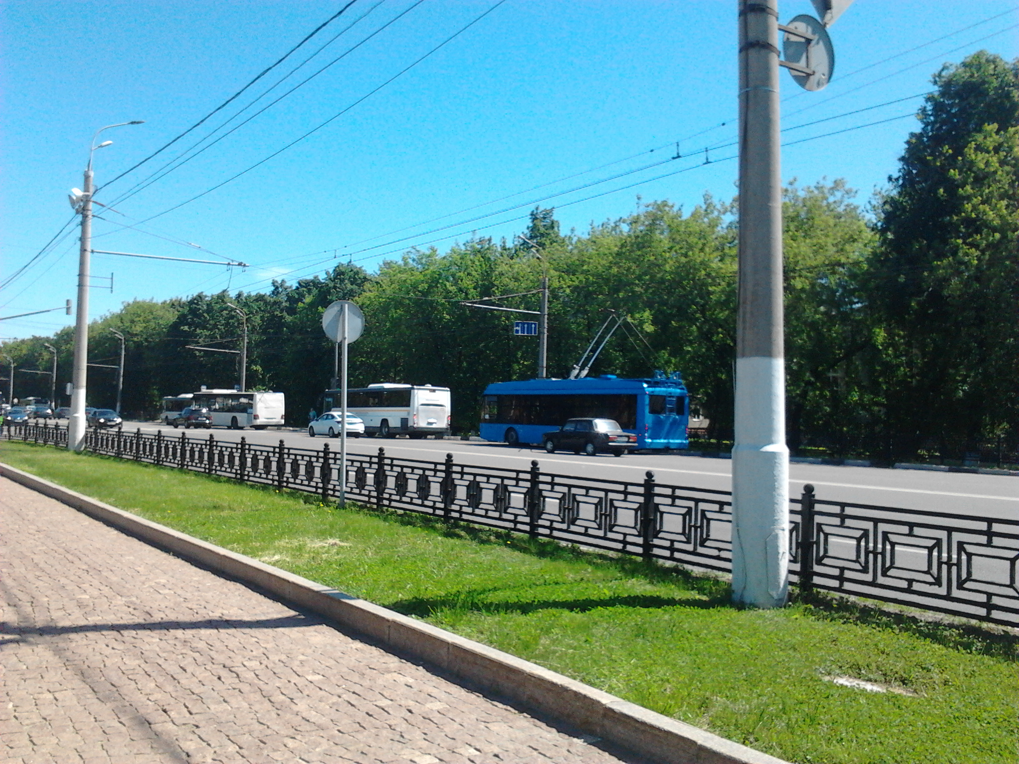 Остановка «Сквер Подольских курсантов»